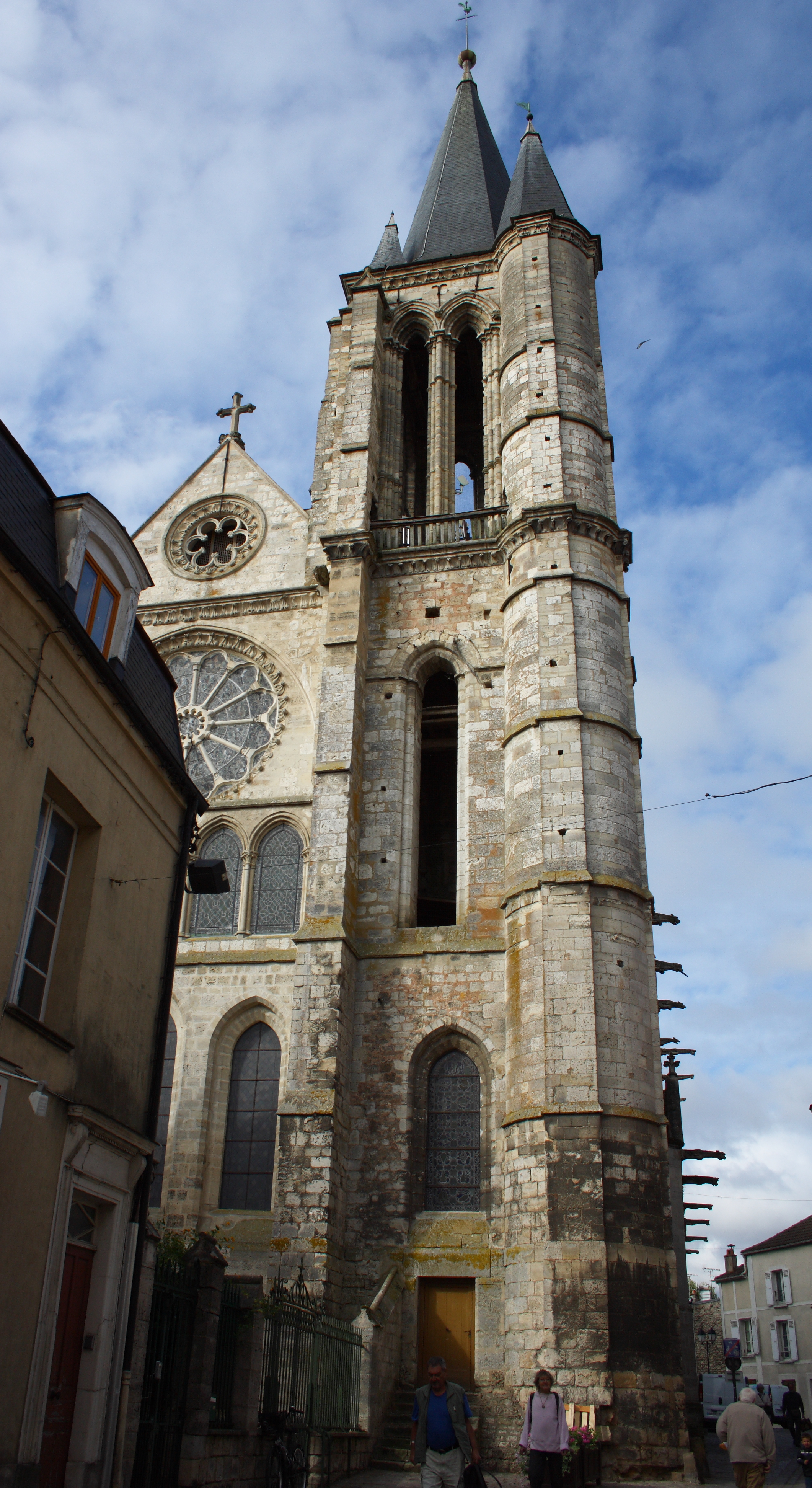 Katholische Pfarrkirche Saint-Étienne in Brie-Comte-Robert im Département Seine-et-Marne in der Region Île-de-France (Frankreich), Glockenturm Object location48° 41′ 25.08″ N, 2° 36′ 30.6″ E